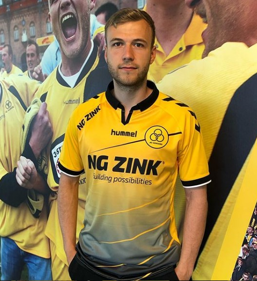 Malte Kiilerich på AC Horsens' kontor